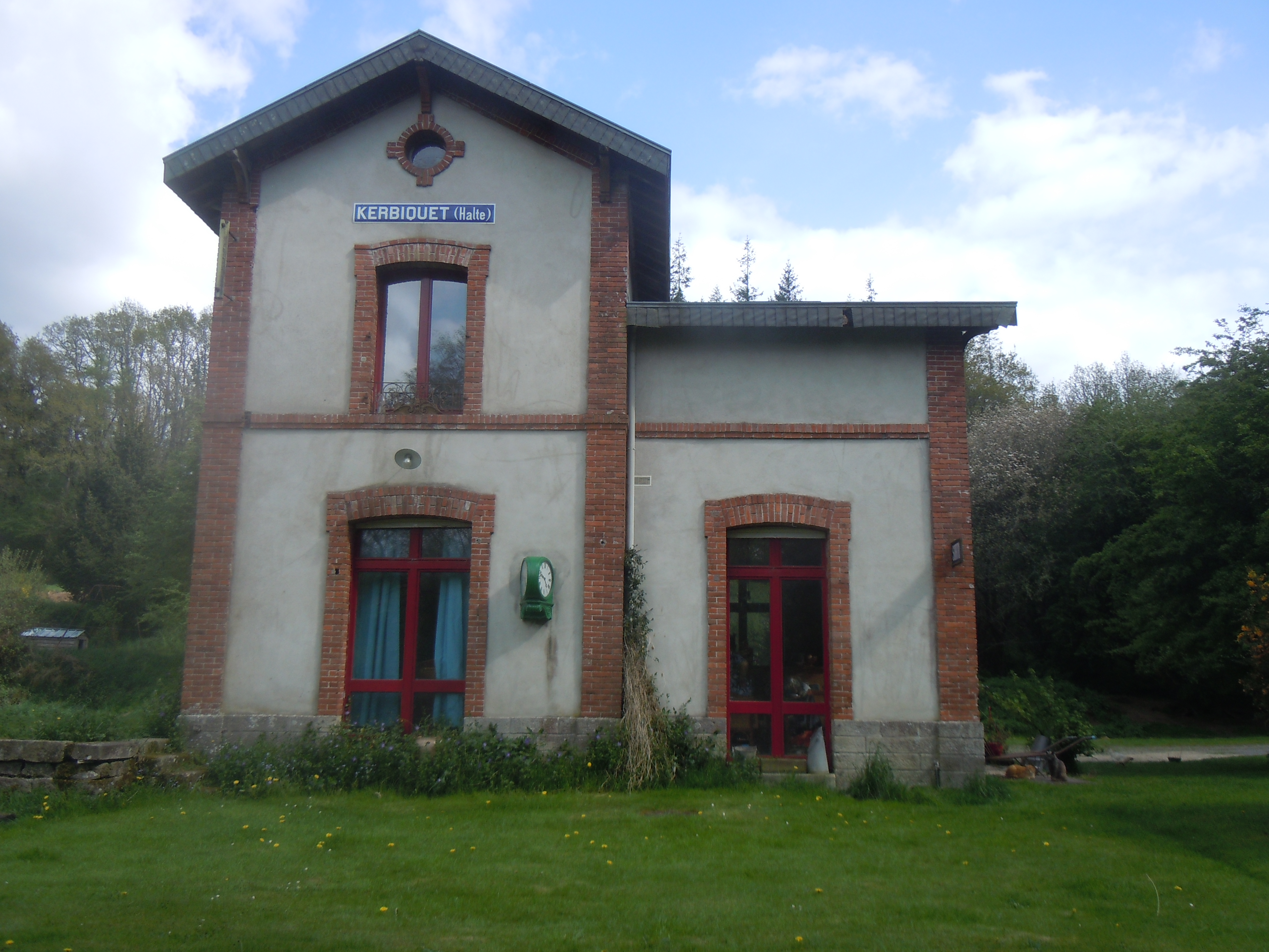 L'ancienne halte de Kerbiquet à Gourin, un des huit arrêts intermédiaires de de la ligne à voie métrique Rosporden Carhaix.